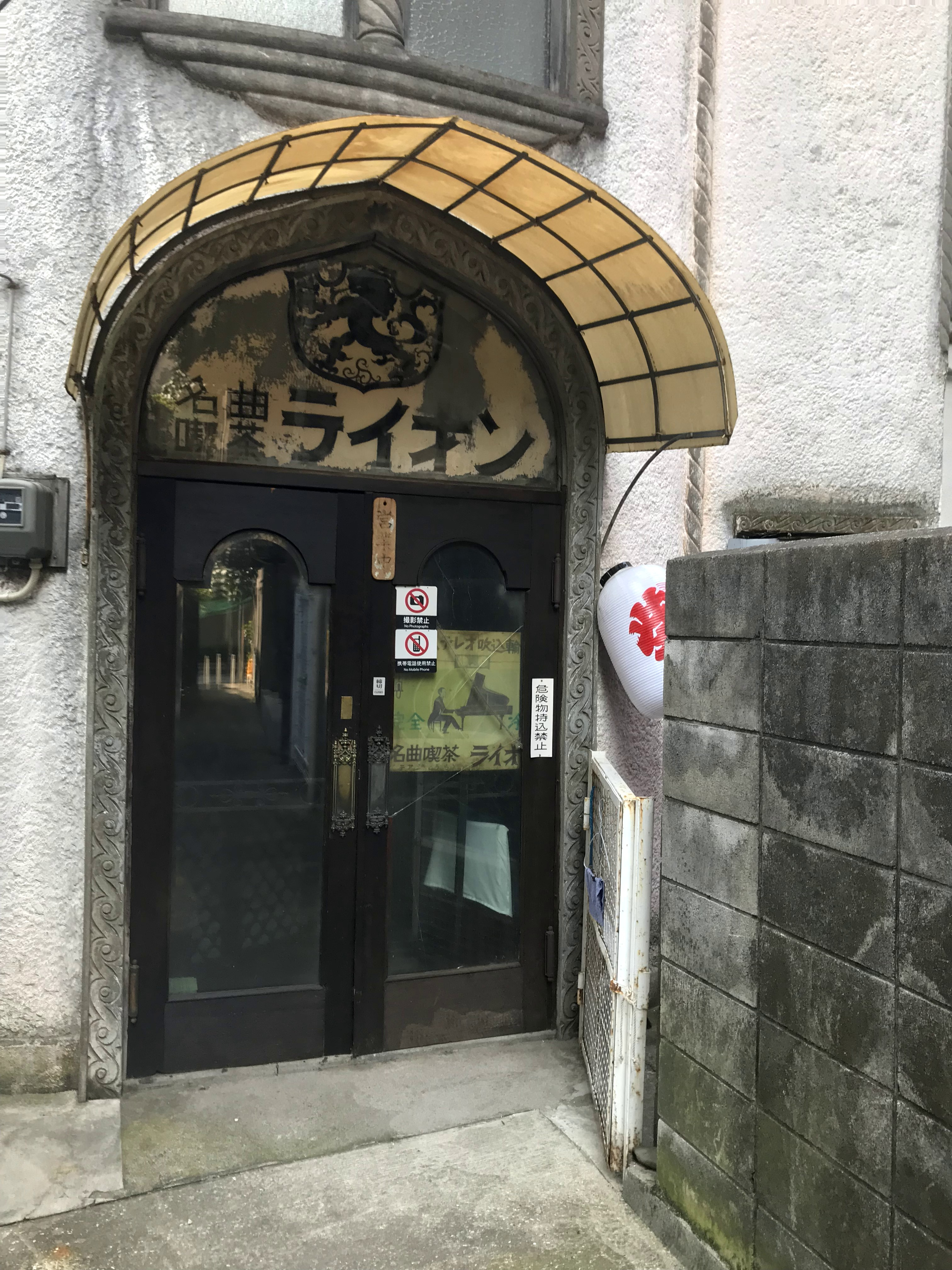 名曲喫茶ライオンの裏口